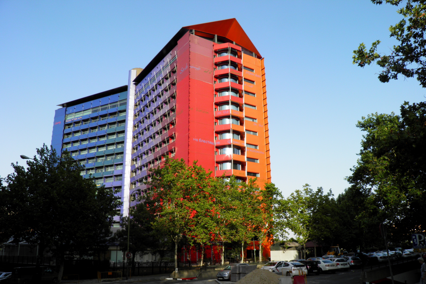 Hotel Silken Puerta América Madrid Fachada: José María Cruz Novillo Avenida de América, 41 Madrid Comunidad de Madrid España